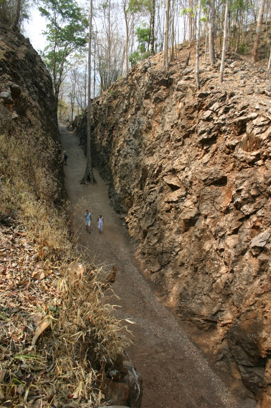 Der sog. Hellfire Pass, eine Schneise, die von Kriegsgefangenen in der Nähe von Kanchanaburi (Thailand) in den Berg geschlagen wurde, um eine Bahnverbindung zu ermöglichen (Thai-Burma-Railway, Death Railway).